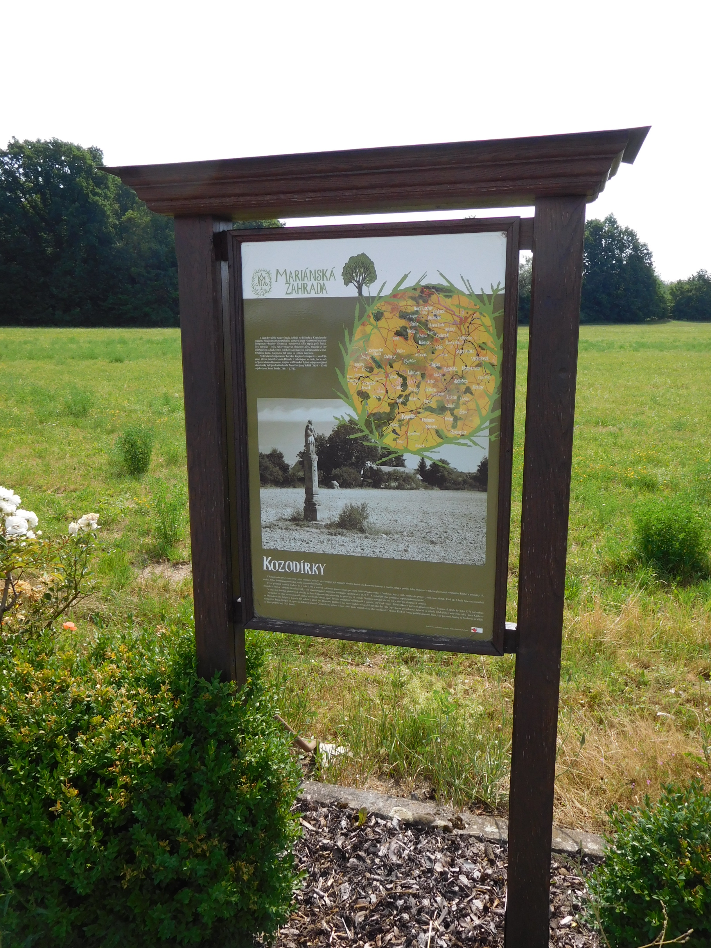 Kozodírky - infotabule Mariánská zahrada